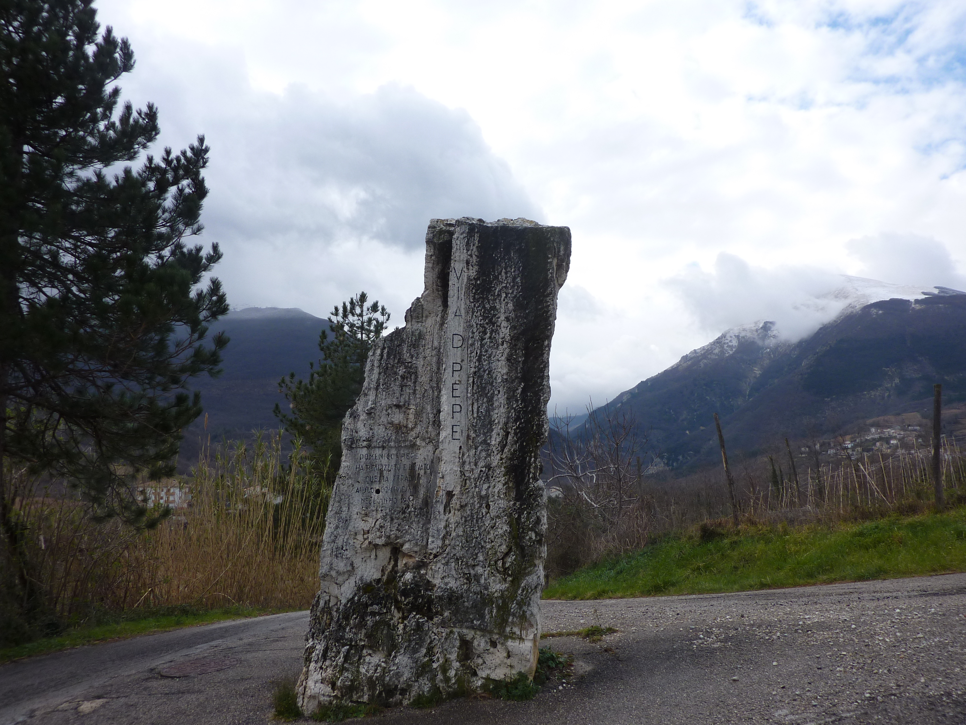 alcuni emigranti di Rocche portarono al paese contributi economici per nuove opere, come Domenico Pepe per la nuova strada al colle San Nicola